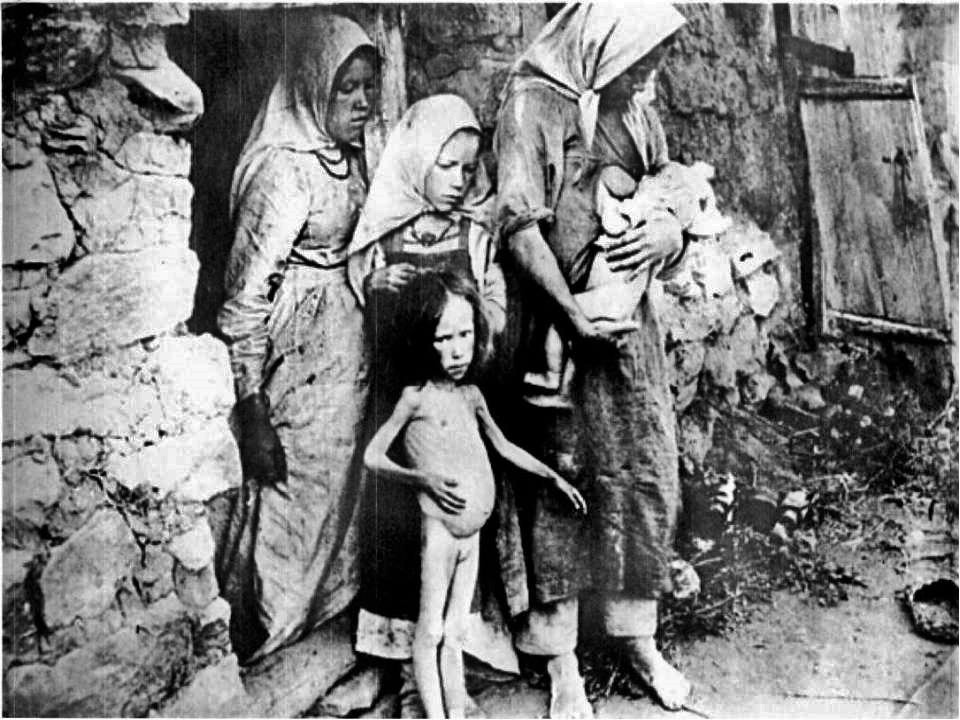 Голод, местность Бузулук (на речке Самара) в Оренбургской области (РСФСР). Этой фотографией часто злоупотребляют (преимущественно без каких-либо подписей или ссылок на источники) для описания голода 1932—1933 гг.